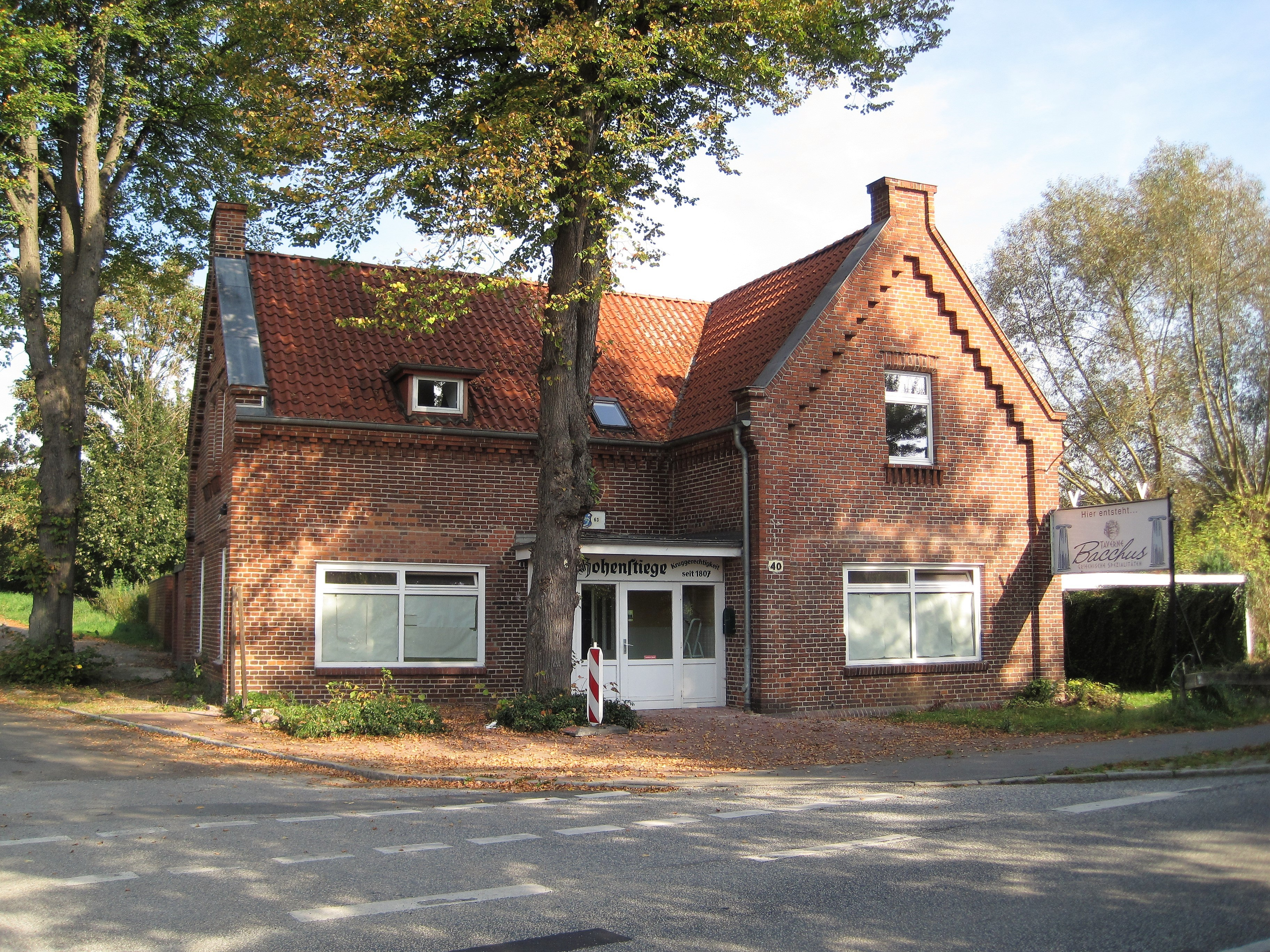 Krug Hohenstiege an der Hamburger Straße in Lübeck